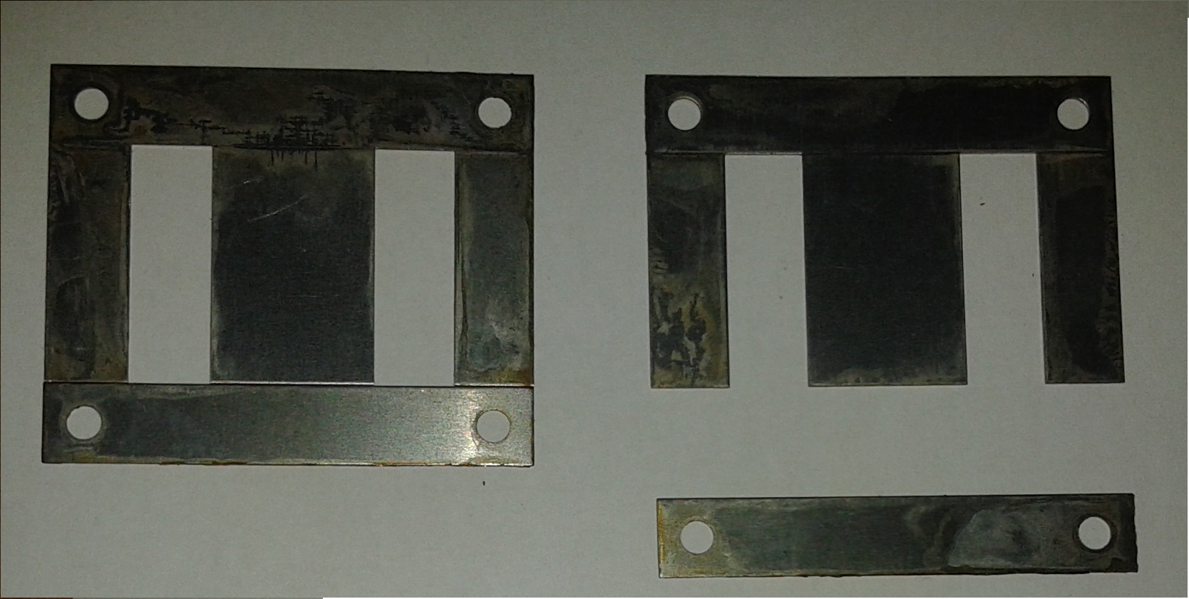 Blachy transformatorowe rdzenia jednofazowego małej mocy.